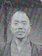 富山新庄教会牧師亀谷凌雲牧師、教会前で特別講演会の時に撮影